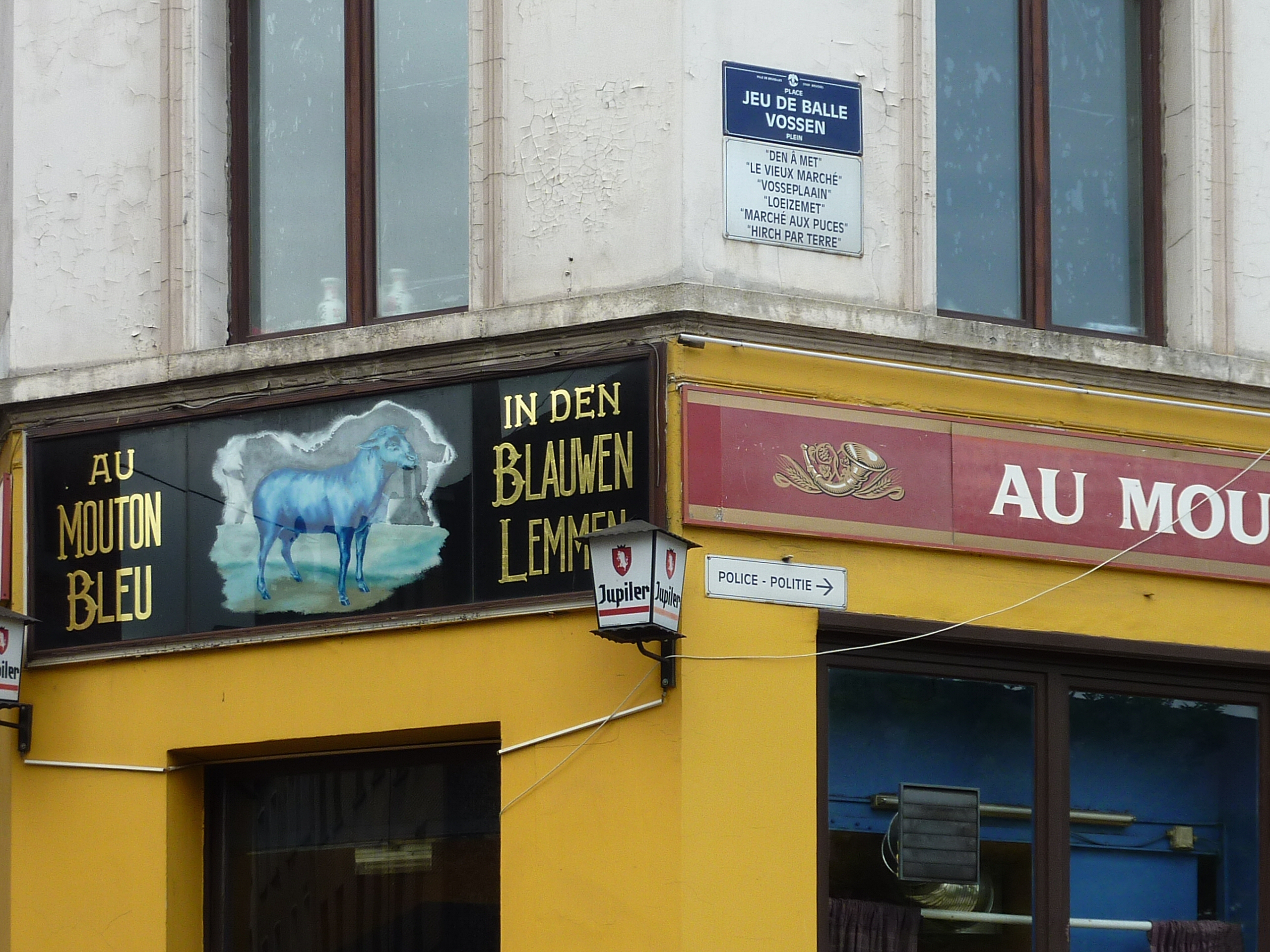 Place du Jeu de Balle quartier des Marolles Bruxelles